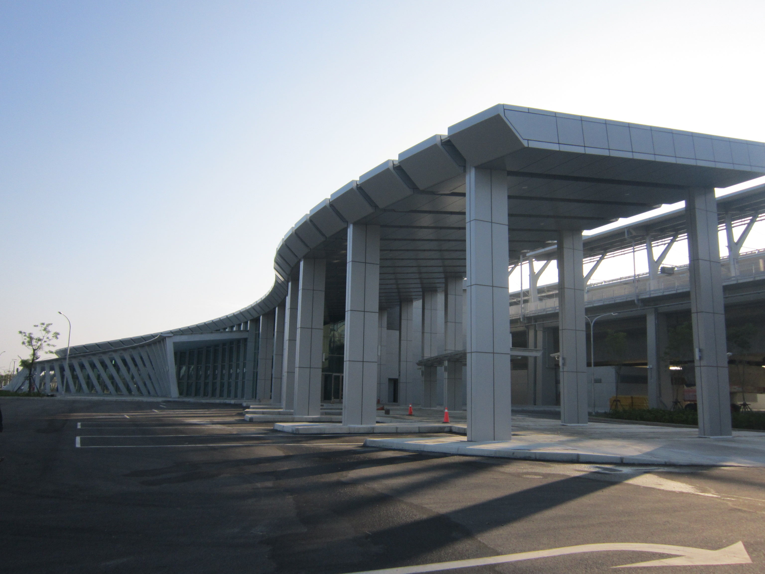 雲林高鐵公車轉運站